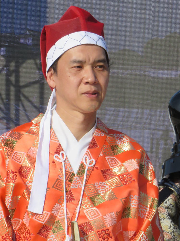 将棋棋士の畠山鎮（平成３０年１１月、姫路市で行われた人間将棋にて）